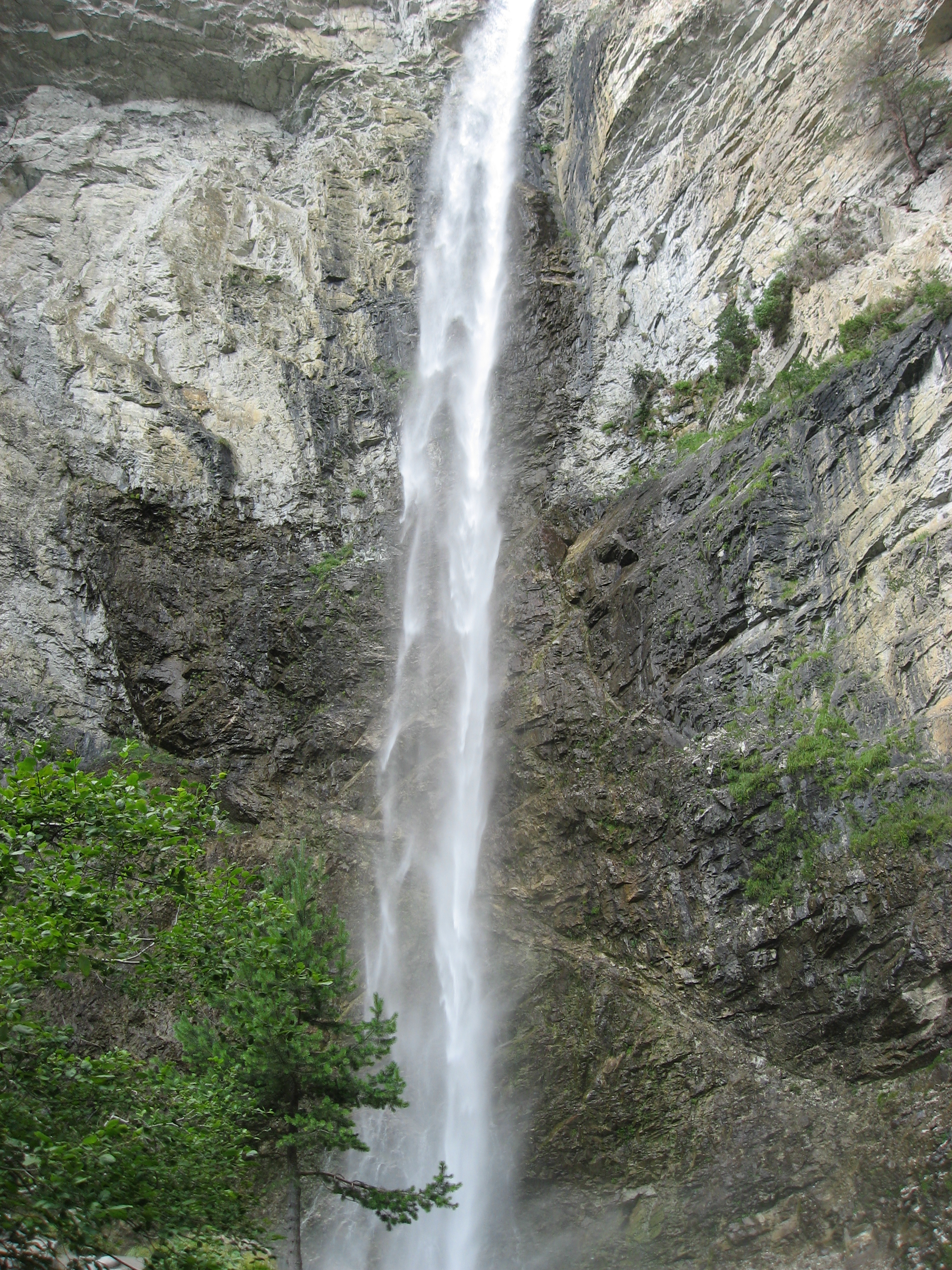 Cascade du Saint-Benoit près d'Avrieux Map: 45° 13' 10" N 6° 43' 40" E - Google Maps - Google Earth